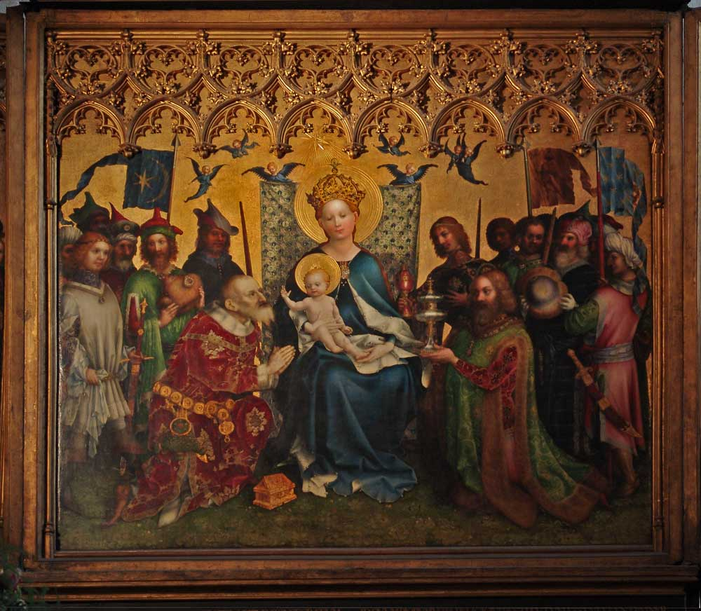 Mittelteil des dreiteiligen Flügelaltars "Altar der Kölner Stadtpatrone" von Stefan Lochner